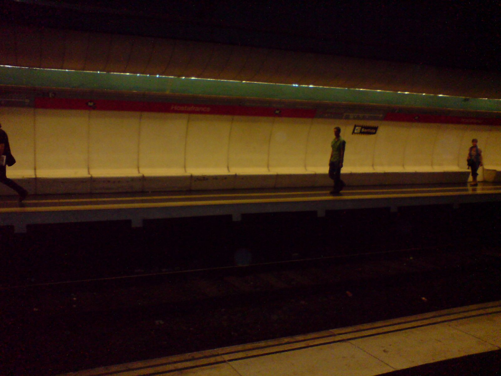 Hostafrancs Metro